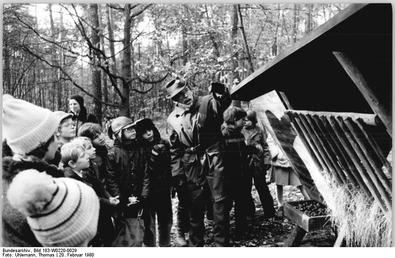 Berlin, Naturkundlicher Vortrag für Schüler ADN-ZB Uhlemann 20.2.1980-Berlin: Der Naturlehrpfad des Lehrkabinetts des Forstwirtschaftsbetriebes Berlin am Teufelssee führt auch an dieser Raufe zur Wildfütterung vroüber. Hier informierte in diesen Tagen Revierförster Arnold Hankel, Leiter des Kabinetts, Schüler aus Köpenick und Lichtenberg über die Möglichkeiten des Menschen, den Tieren im Winter zu helfen.